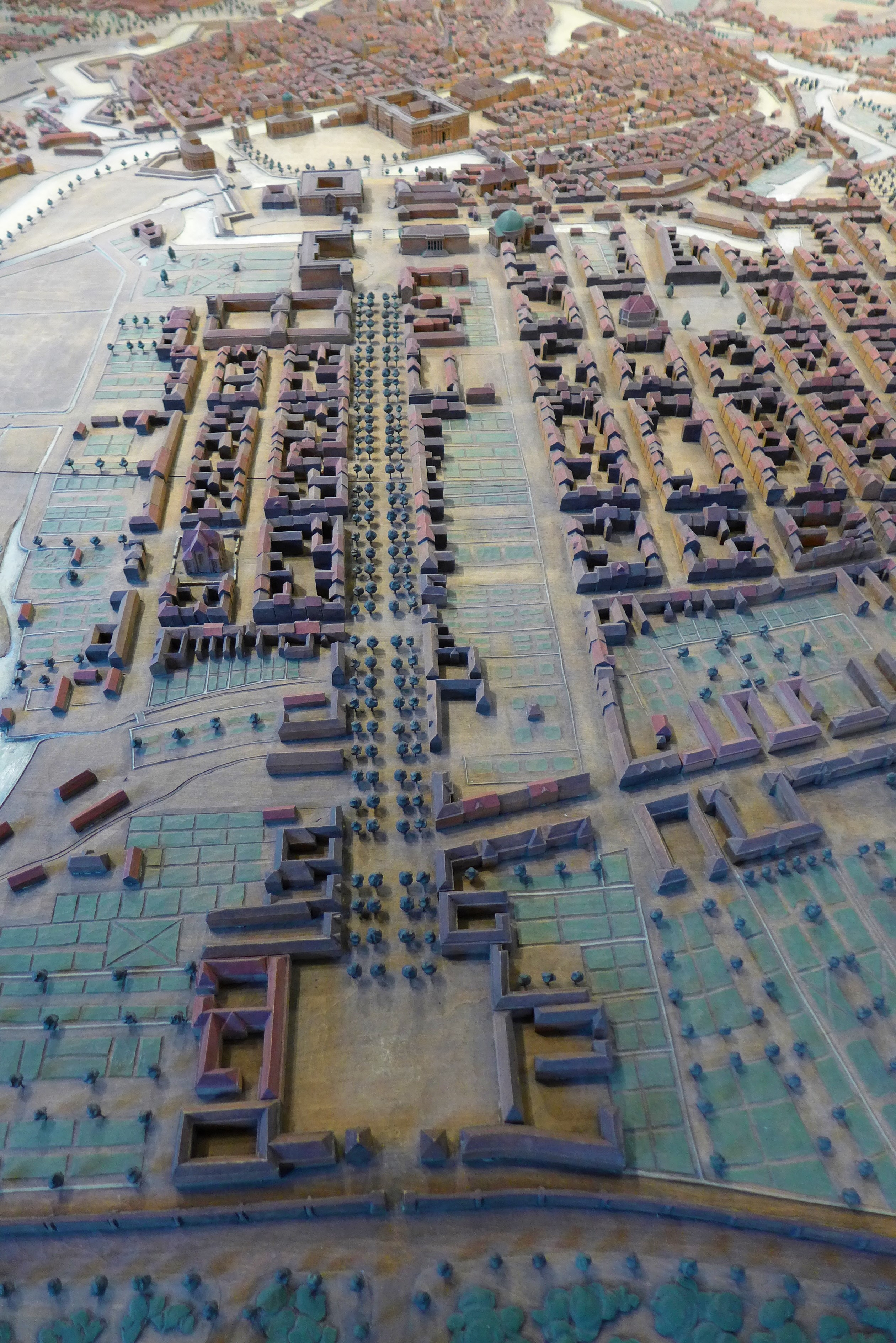 Unter den Linden, Situation um das Jahr 1750; Vorne das Brandenburger Tor; Am Ende der Straße das Stadtschloss, Berliner Stadtmodell im Märkischen Museum